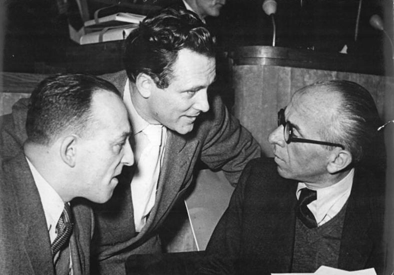 Illus Quasch. 9.12.1951 Deutscher Architektenkongress in Berlin. Im Haus der Volkskammer in Berlin begann am 9.12.1951 ein Deutscher Architektenkongress, an dem auch ausländische Gäste teilnehmen. UBz: Prof. Henselmann (Mitte) im Gespräch mit den beiden polnischen Gästen Zbigmew Skibniewski und Josef Sigalin.